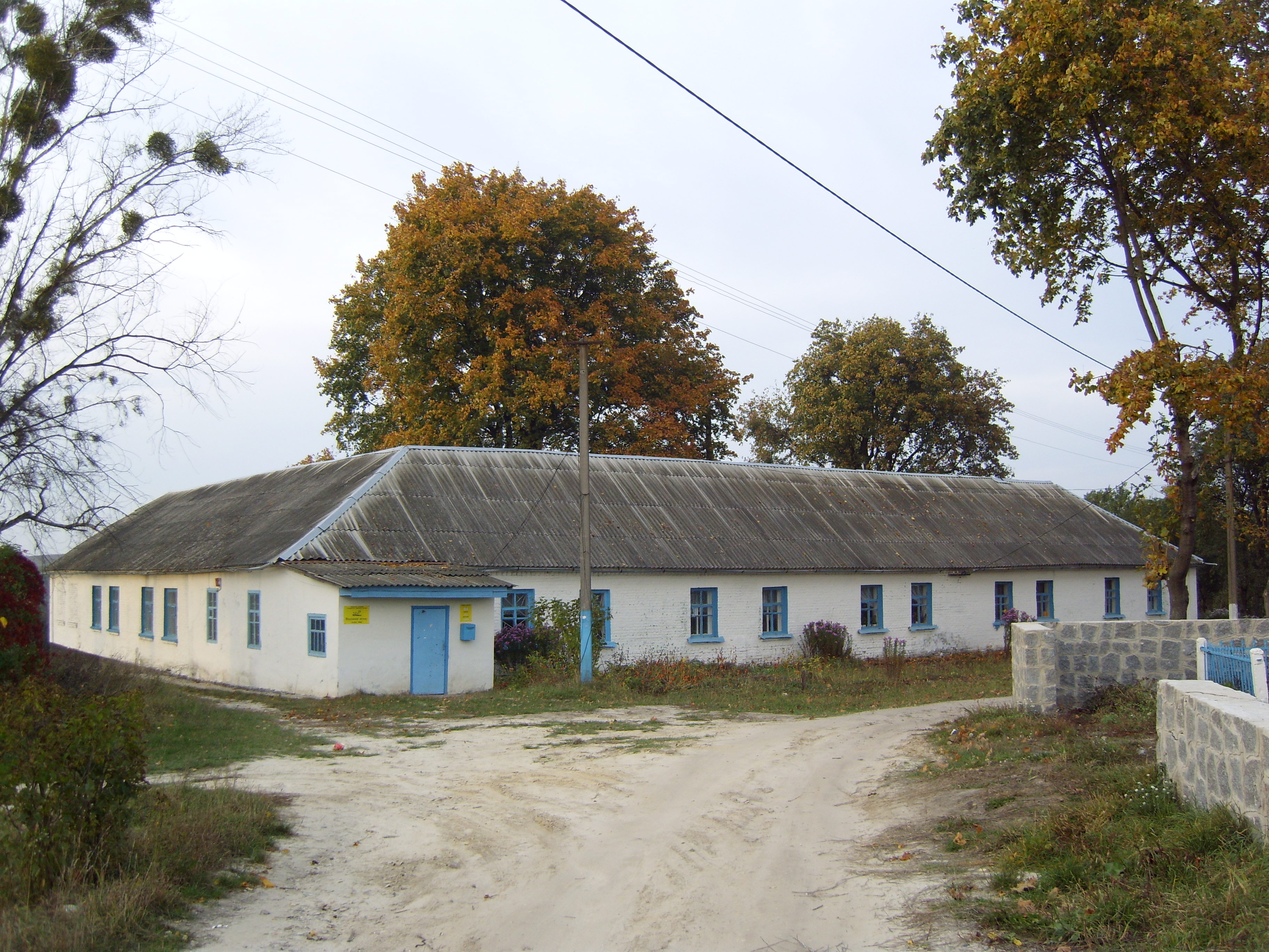 Будівля неповної восьмирічної школи та поштового відділення 08634 у Гвоздові Васильківського району.